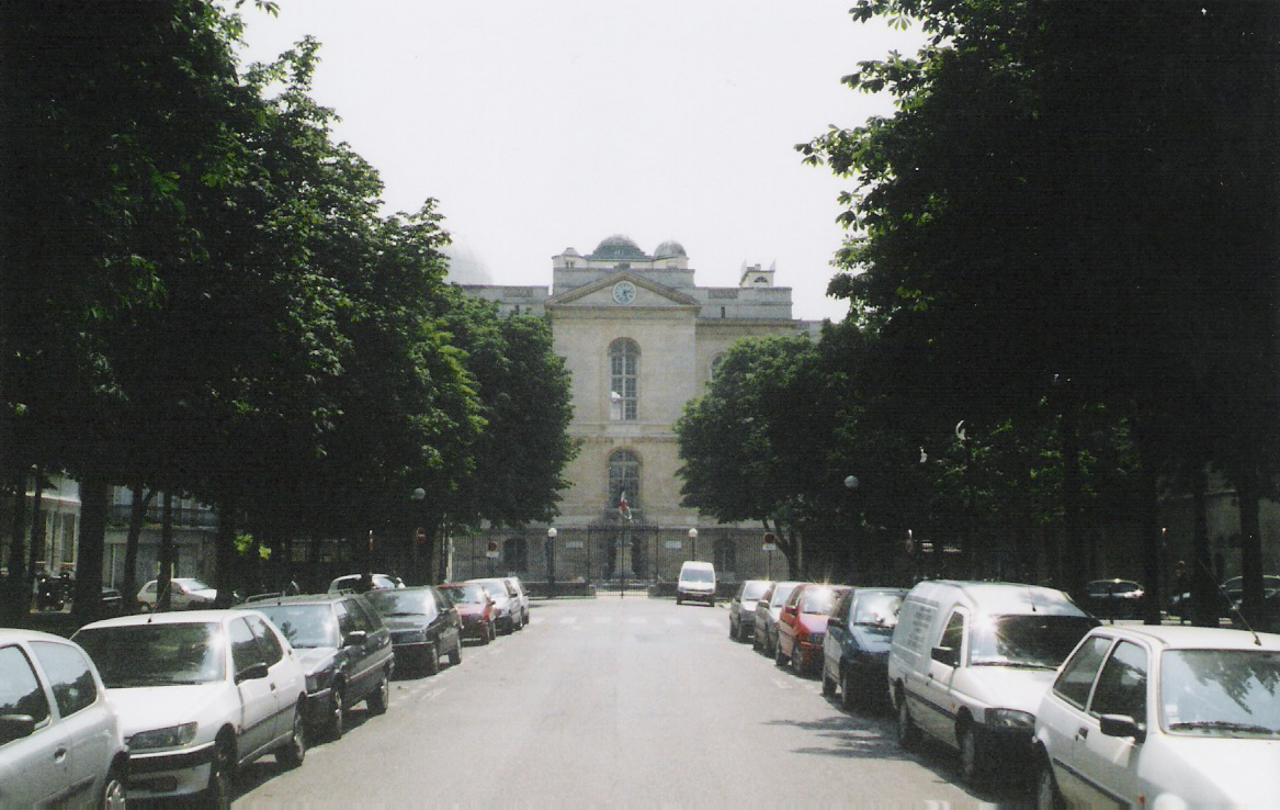 Facade de l'Observatoire de Paris.